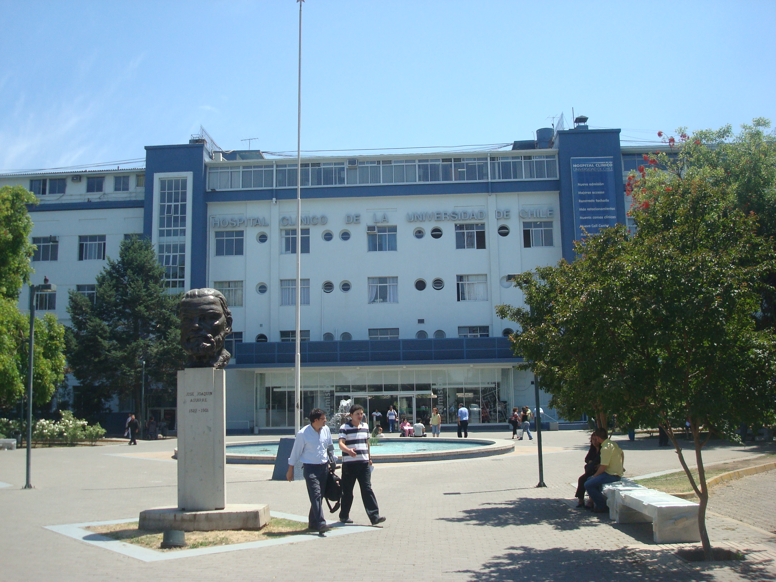 Hospital Clínico de la Universidad de Chile, Independencia, Santiago de Chile